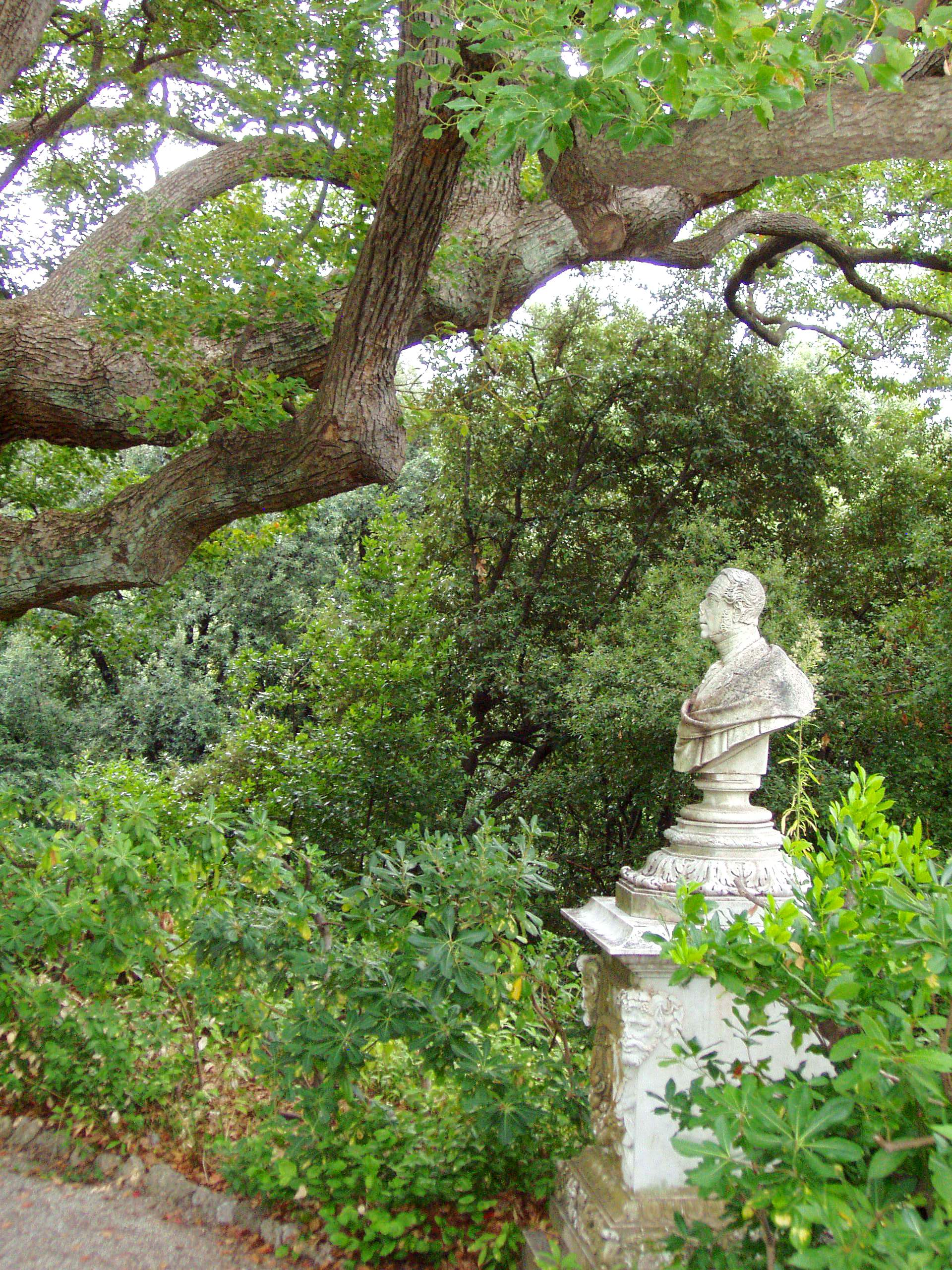 Villa Durazzo-Pallavicini - bust of Michele Canzio, the garden's designer. Pegli, Italy. Sculptor: Giovanni Battista Cevasco